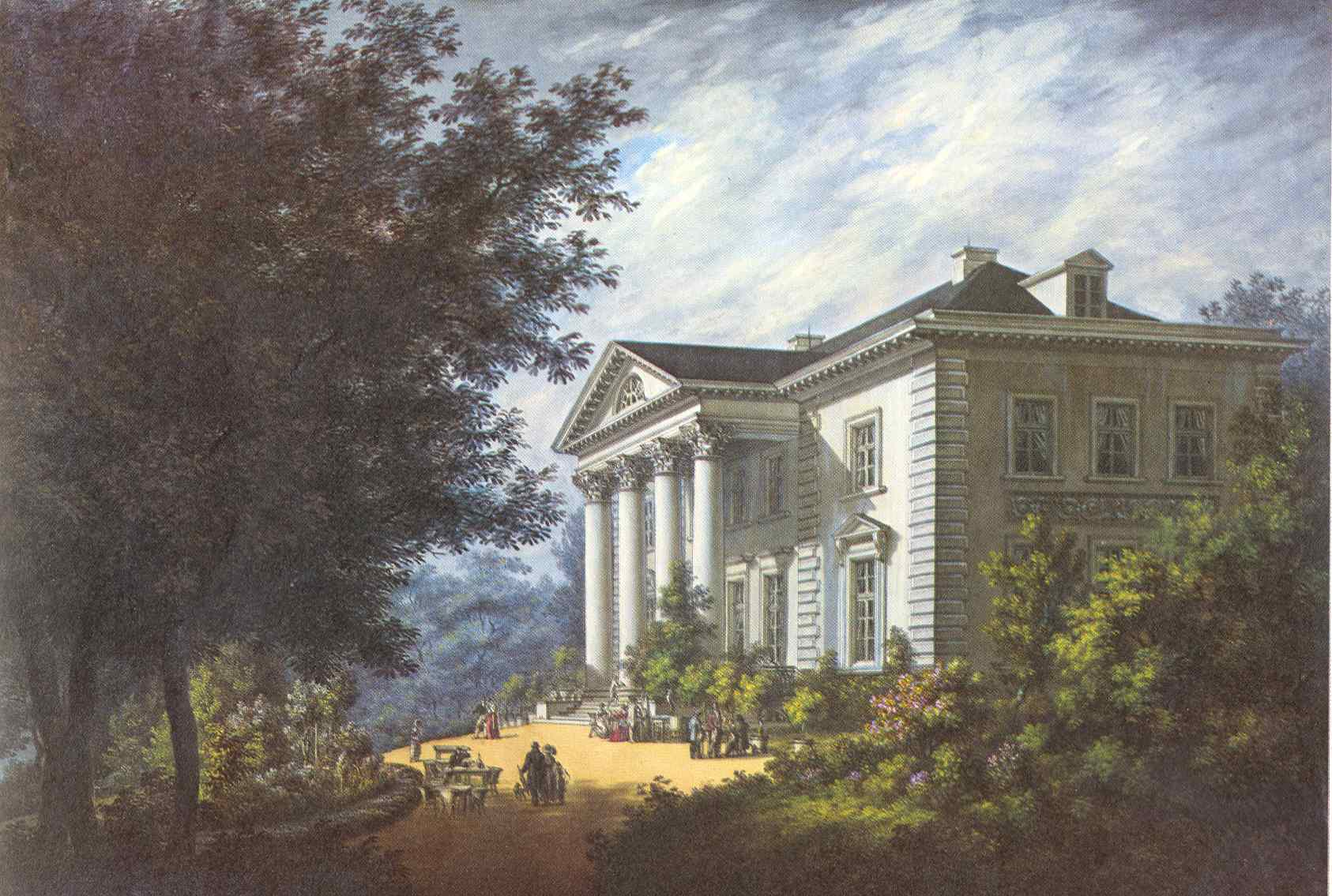 Landhaus des Senators Prösch an der Alten Rabenstraße, 1820 erbaut, 1842 abgebrochen